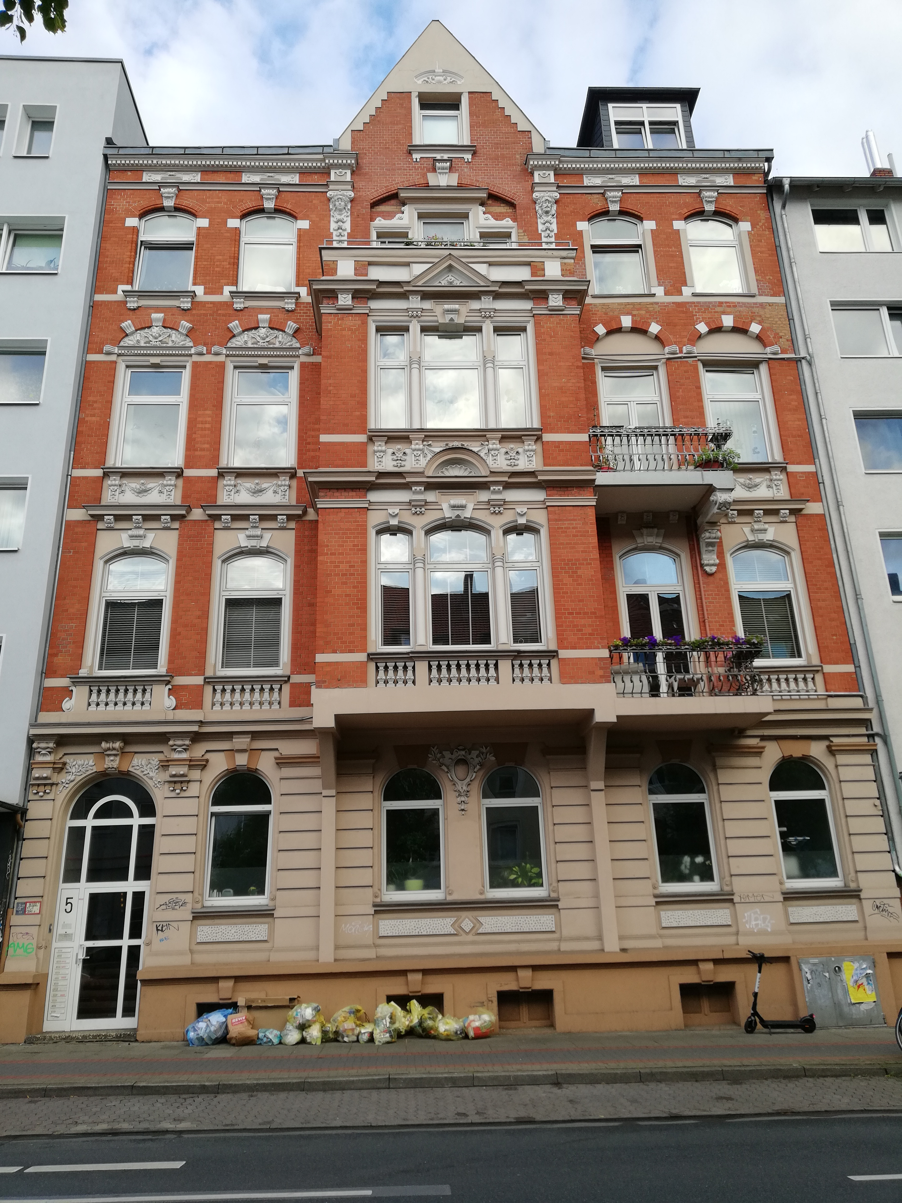 Das Mehrfamilien-Wohnhaus Königsworther Straße 5, ab 1897 von dem Architekten und Maurermeister Wilhelm Weber noch unter der damaligen Adresse Lindener Straße 47 erbaut, war ab 1898 Eigentum des Mathematiker, Gymnasialprofessors und Schulbuchautors Otto Presler, der dort mit seiner Ehefrau, der späteren Schriftstellerin Johanna Presler(-Flohr) und den Kindern der Familie wohnte ...